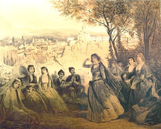 Sad v okrestnostiakh Tiflisa-tanets "Lezginka".